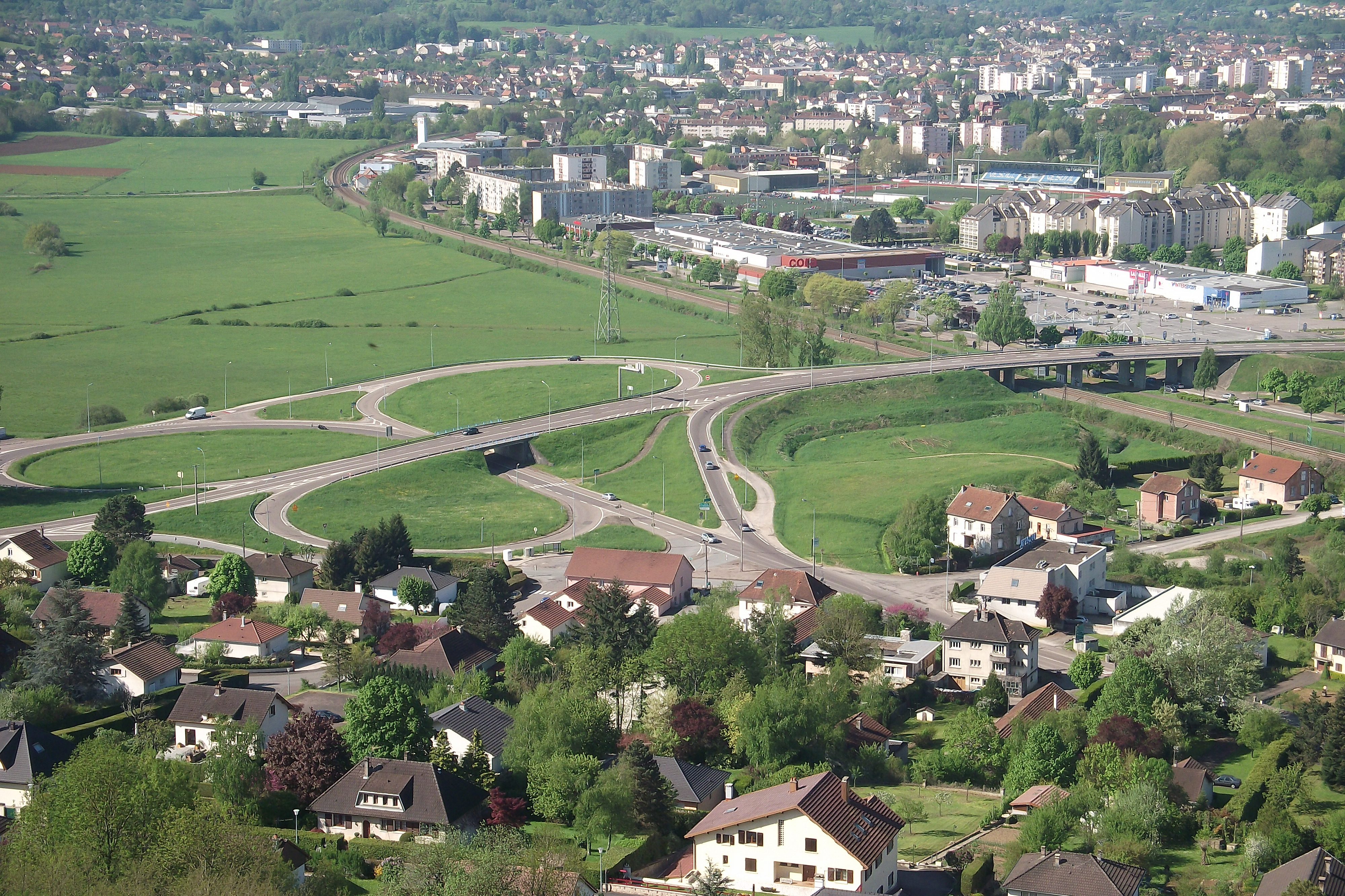 L'ancienne zone du Transmarchement de Vesoul (Haute-Saône, Franche-Comté)